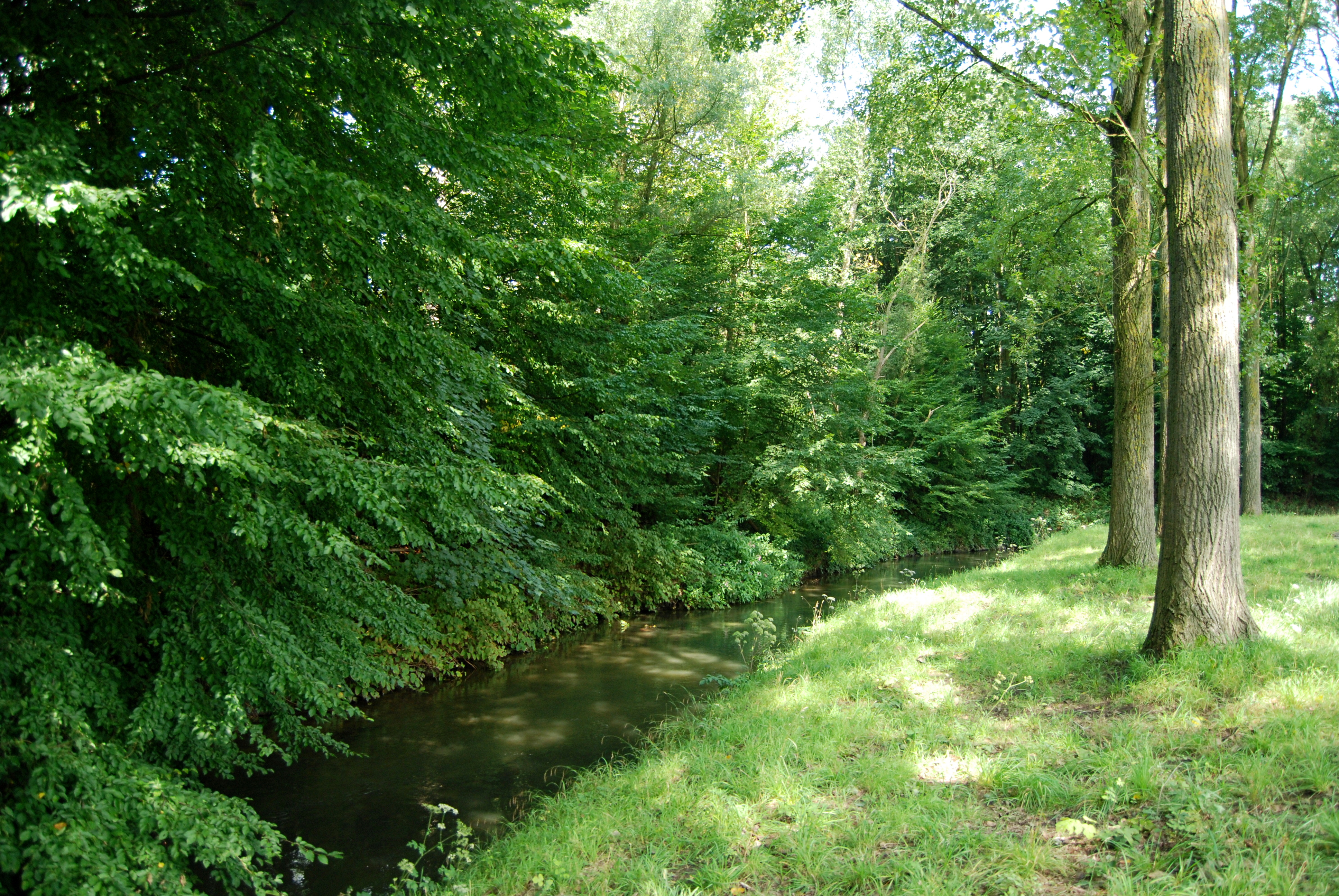 Belgique - Brabant wallon - Ottignies - la Dyle à la sortie d'Ottignies